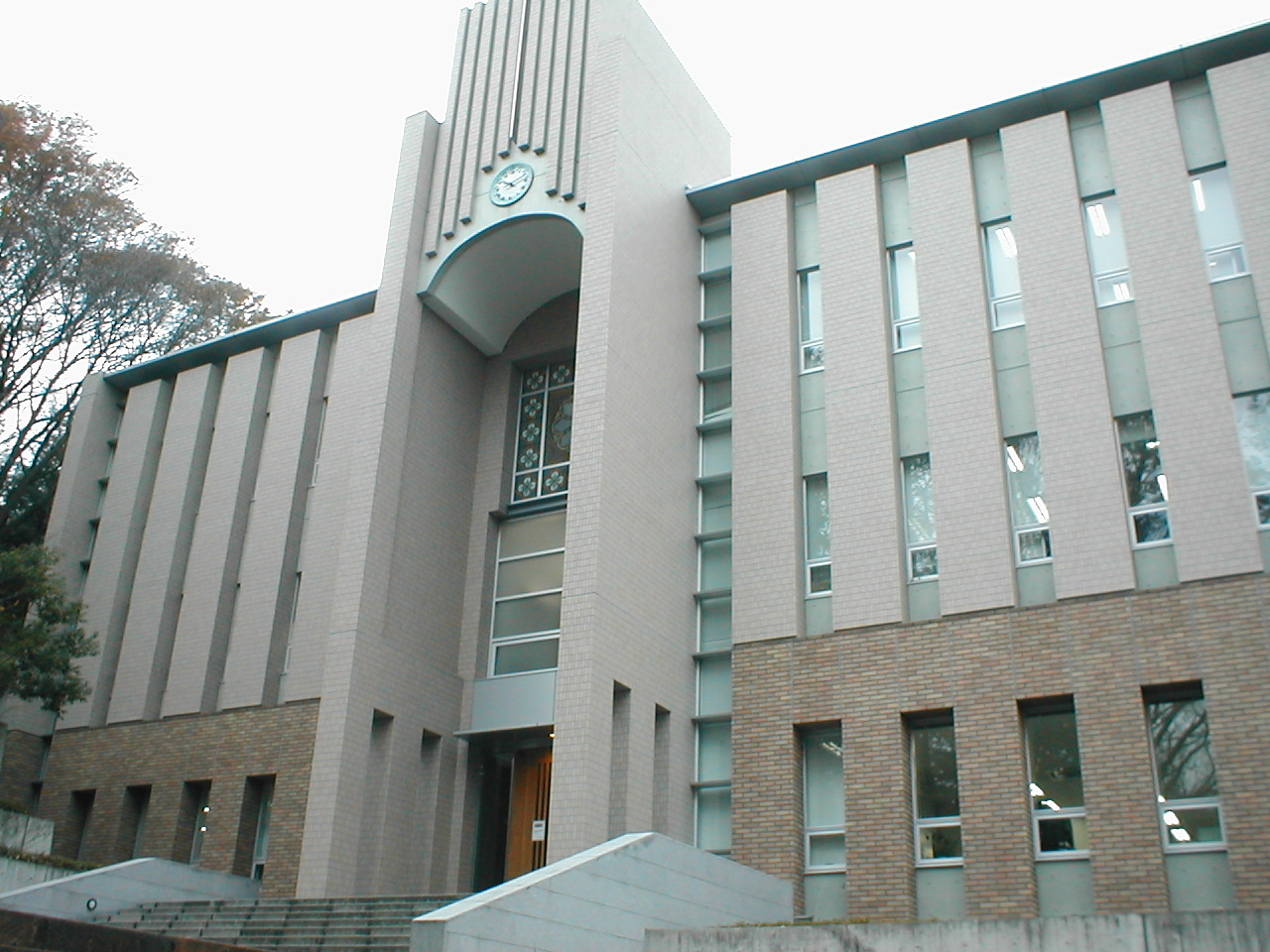 中央大学多摩キャンパスで撮影。